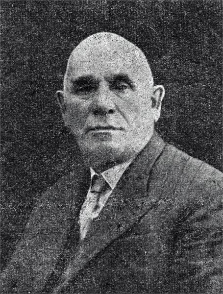 ארגנטינה - מרדכי רוזובסקי ממנהיגי יהדות ארגנטינה